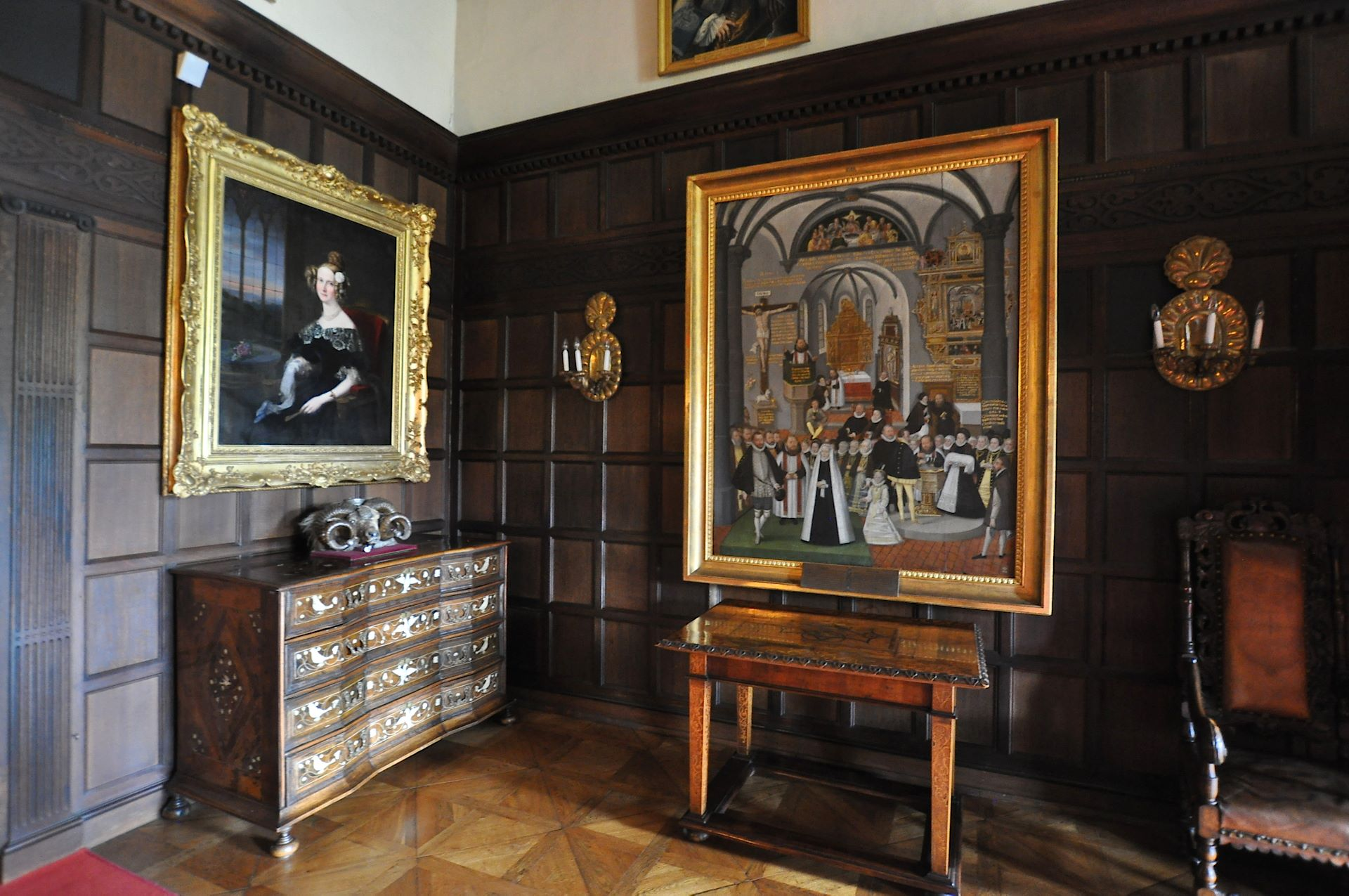 Schloss Opočno